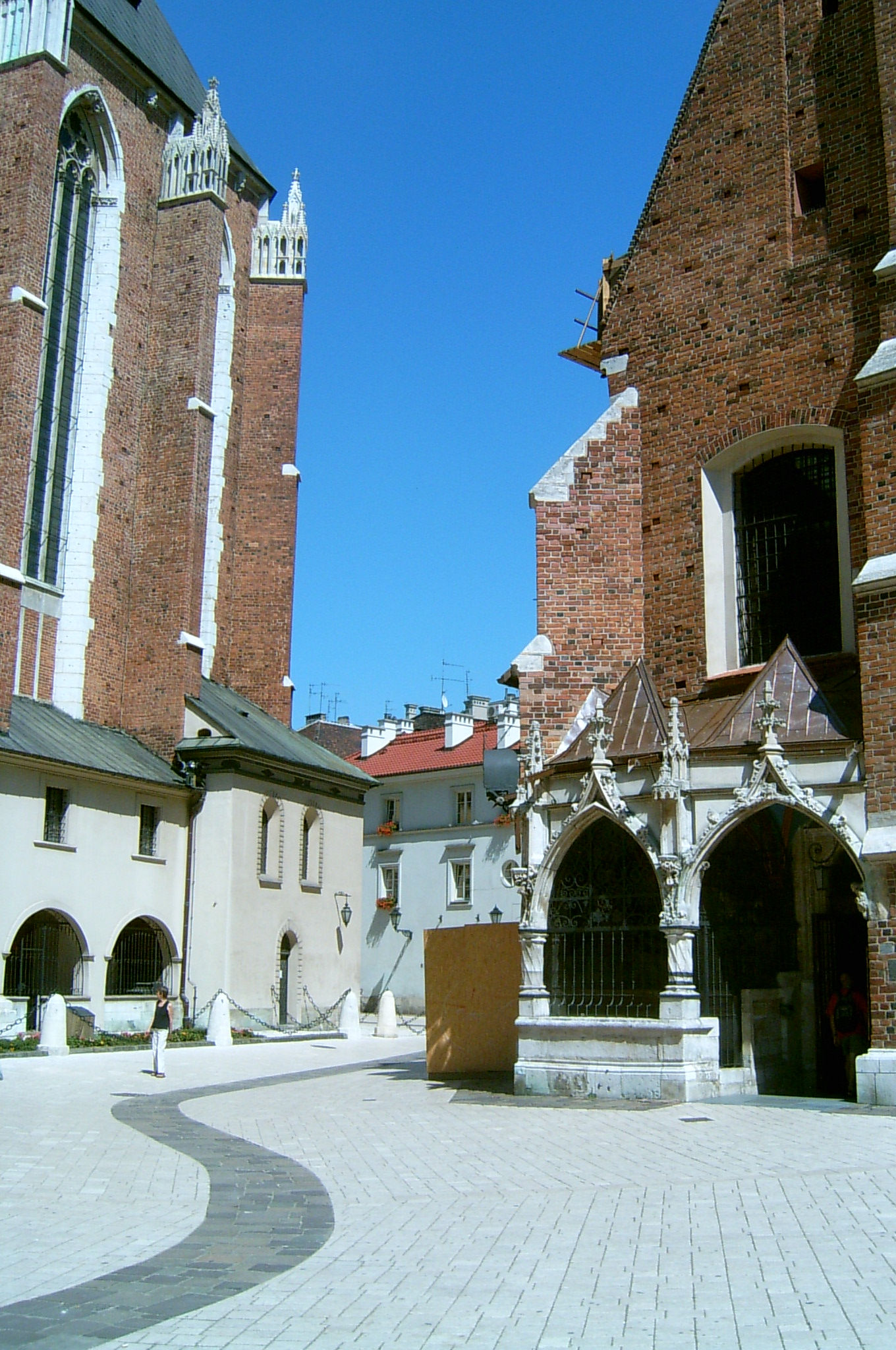 Kraków, Poland